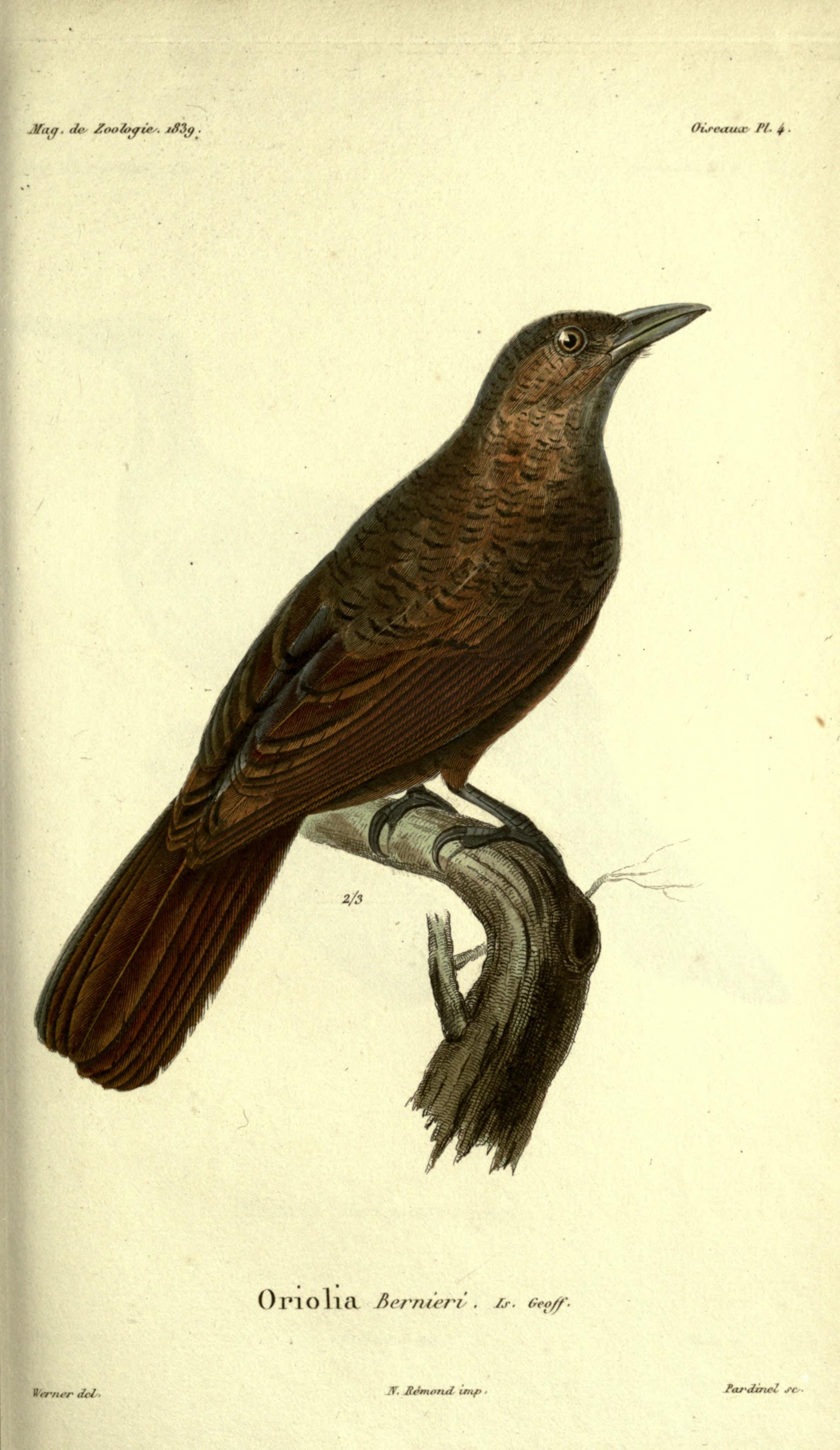 Magasin de zoologie.